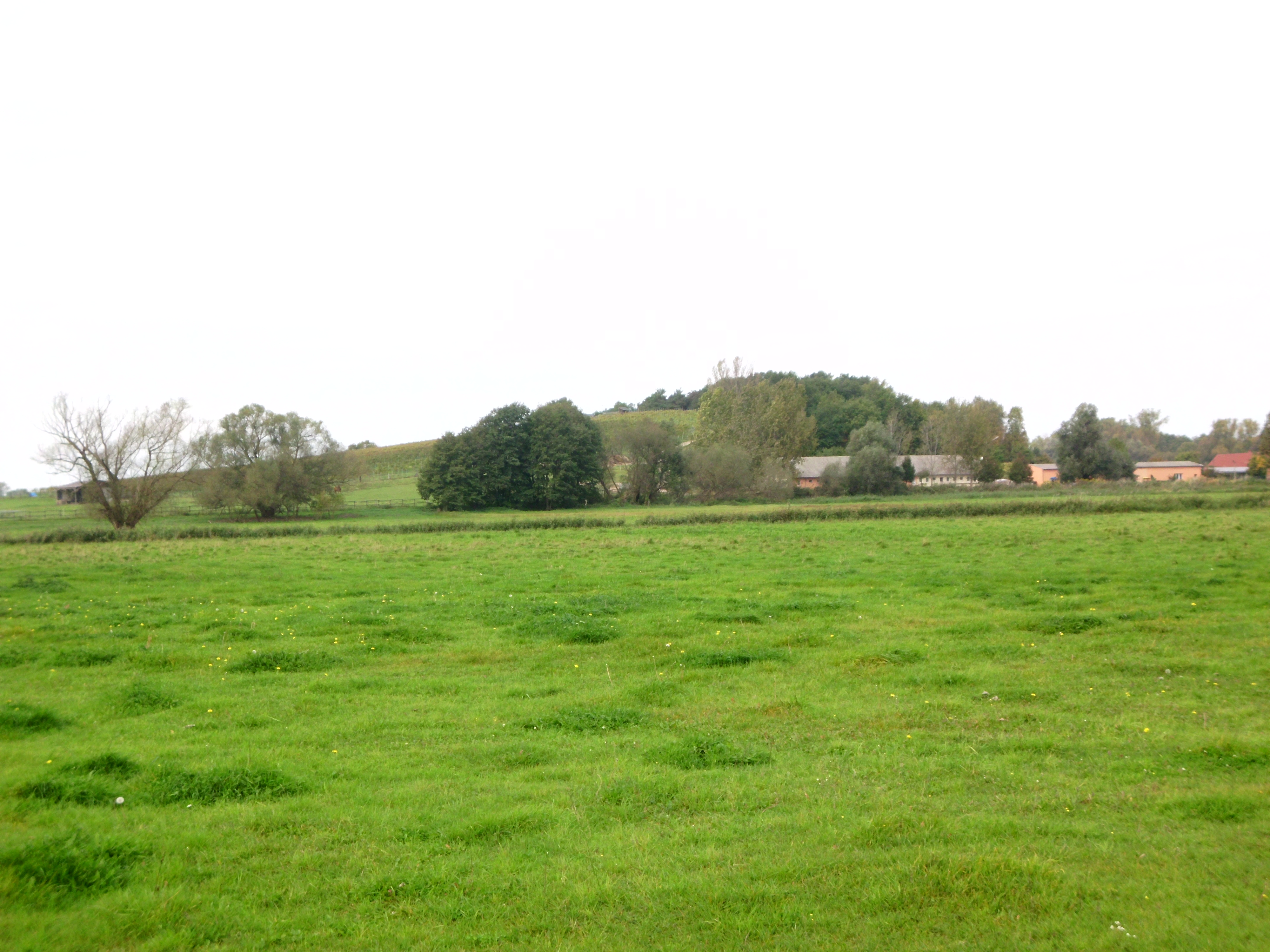 der "alte Weinberg" bei Töplitz (OT von Werder (Havel))